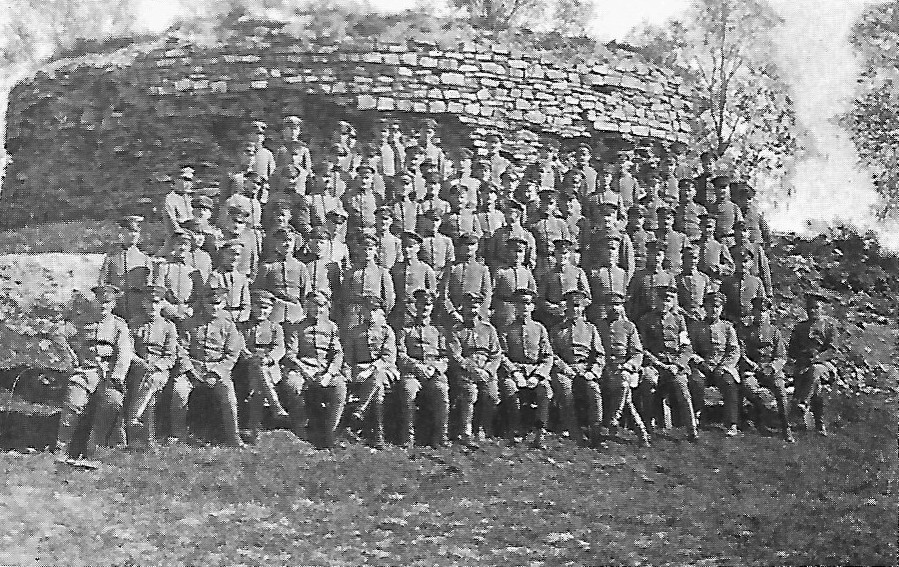 Offizier-Korps der 15er in Gaurain-Ramecroir (Belgien)